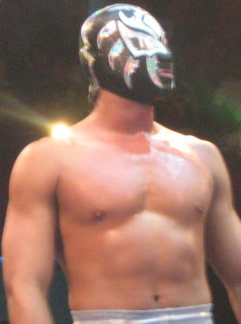 La Sombra.